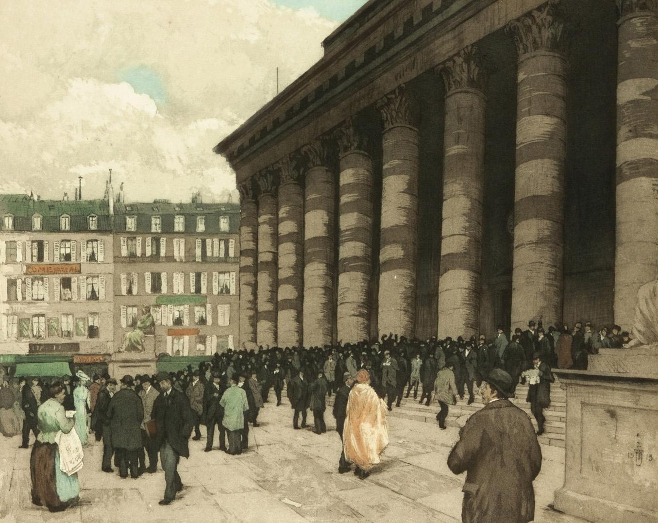 Die Pariser Börse, rechts unten mit Bleistift signiert: T. F. Šimon, links unten mit Bleistift nummeriert: 110, Radierung und Aquatinta/Papier, 35 x 44 cm